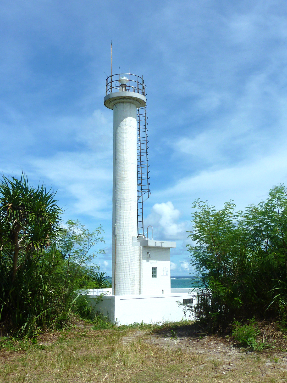 黒島灯台（沖縄県八重山郡竹富町黒島）